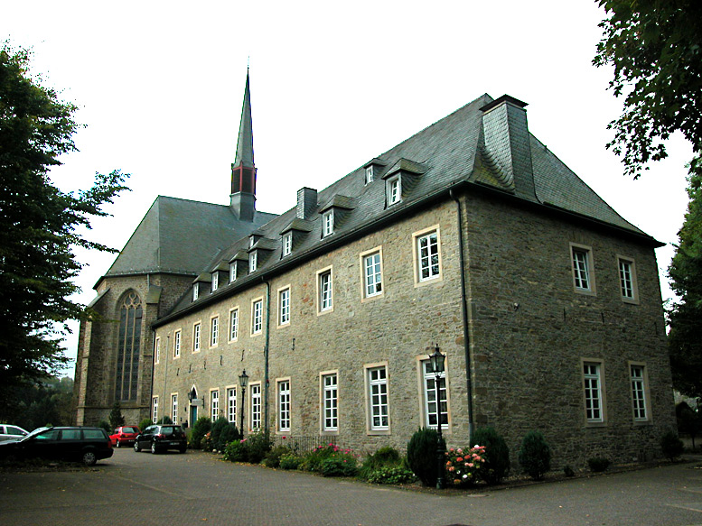 Teilstrecke 1a Wuppertal Beyenburg - Remscheid-Lennep, 0 km (Klosterkirche)